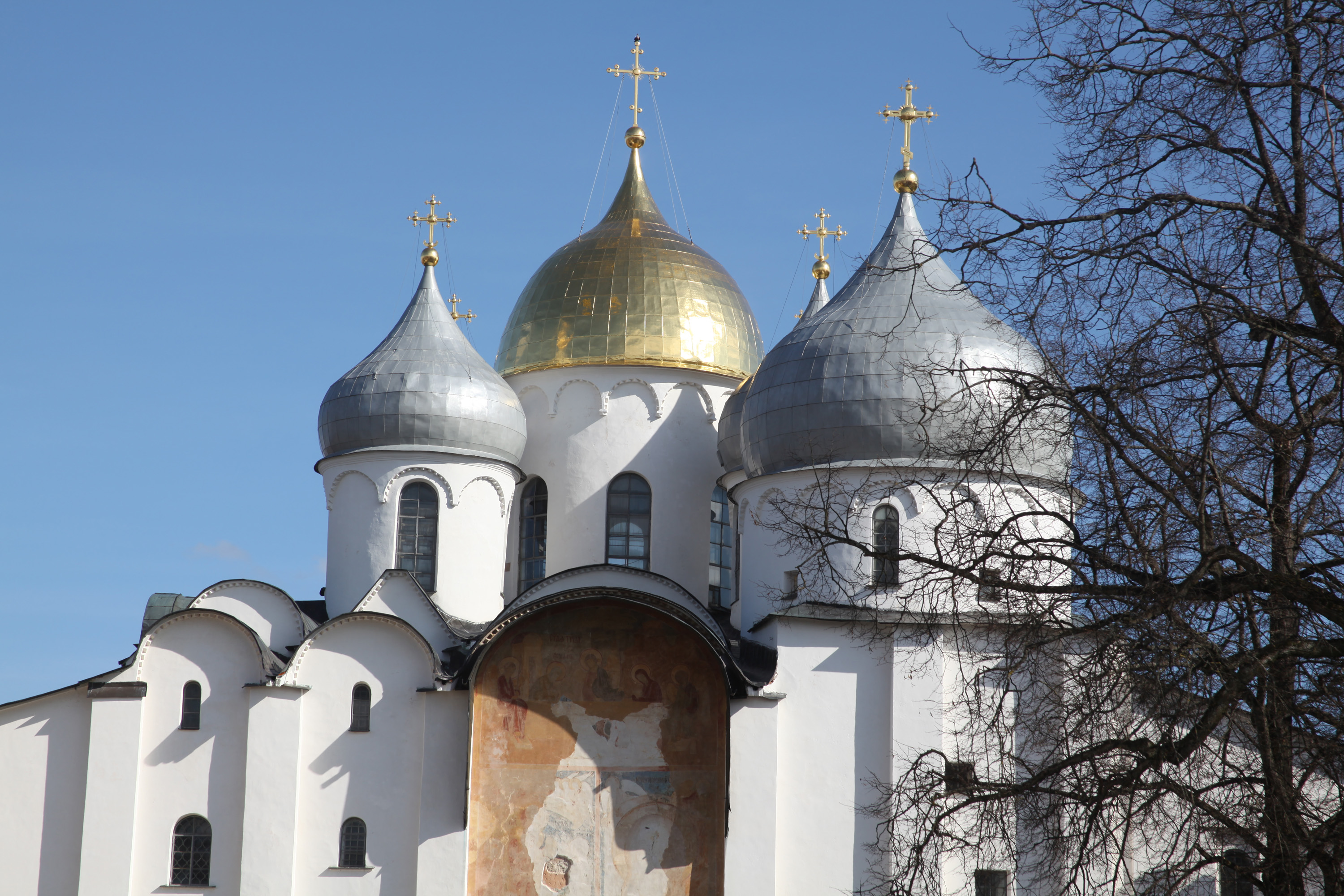 Собор Софийский: Великий Новгород, Новгородская область